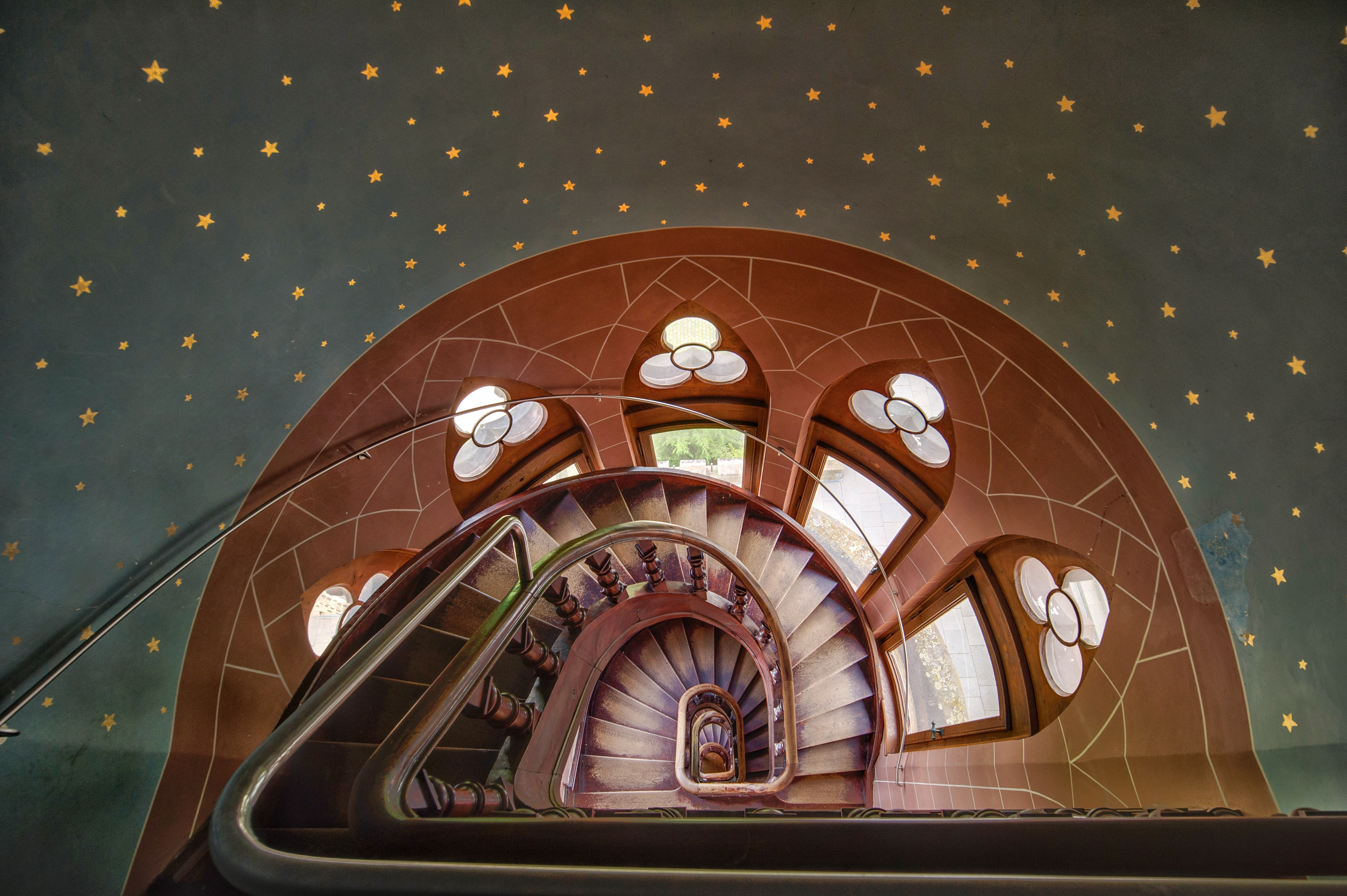 Das Treppenhaus im Nordturm von Schloss Drachenburg. Blick nach unten vom oberen Ende der Wendeltreppe, wo ein märchenhafter Sternenhimmel an die Decke gemalt ist.This is a photograph of an architectural monument., no. A 51